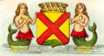 Gemeentewapen van Steenbergen. © fl/jongefrd/wapen.jpg